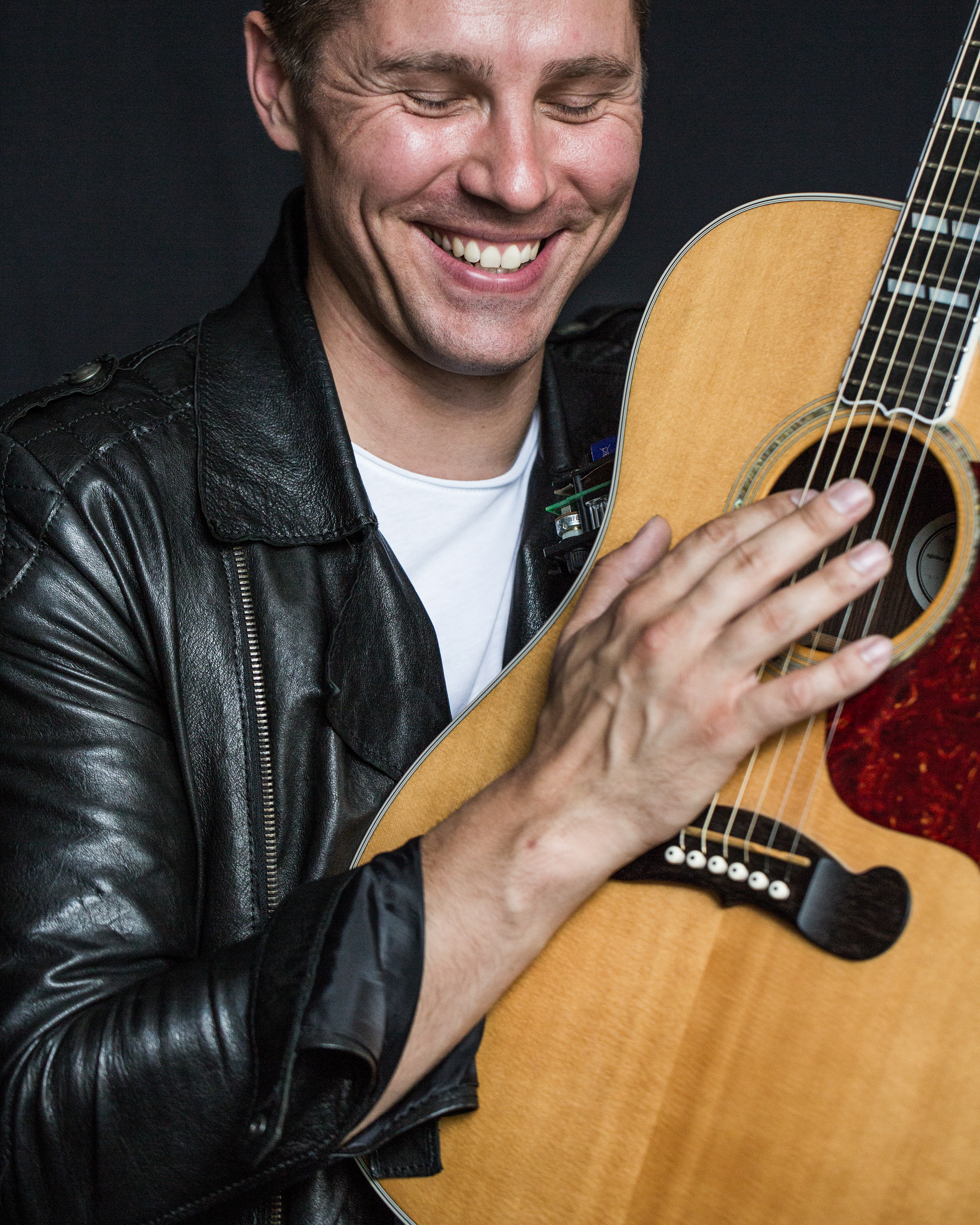 Marcis Auzins